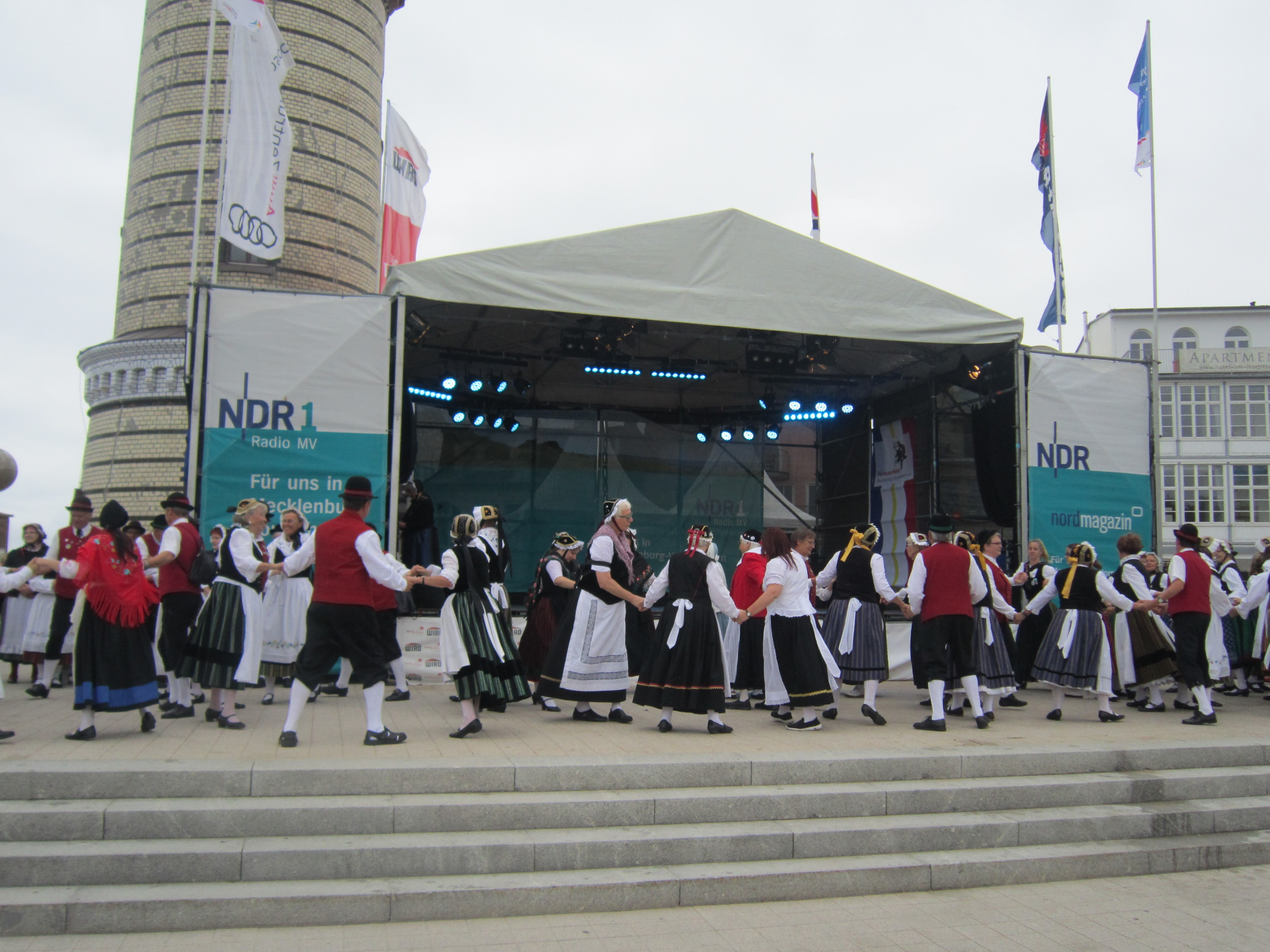 Gemeinsamer Tanz aller Teilnehmenden am Trachtenumzug während der Warnemünder Woche 2019